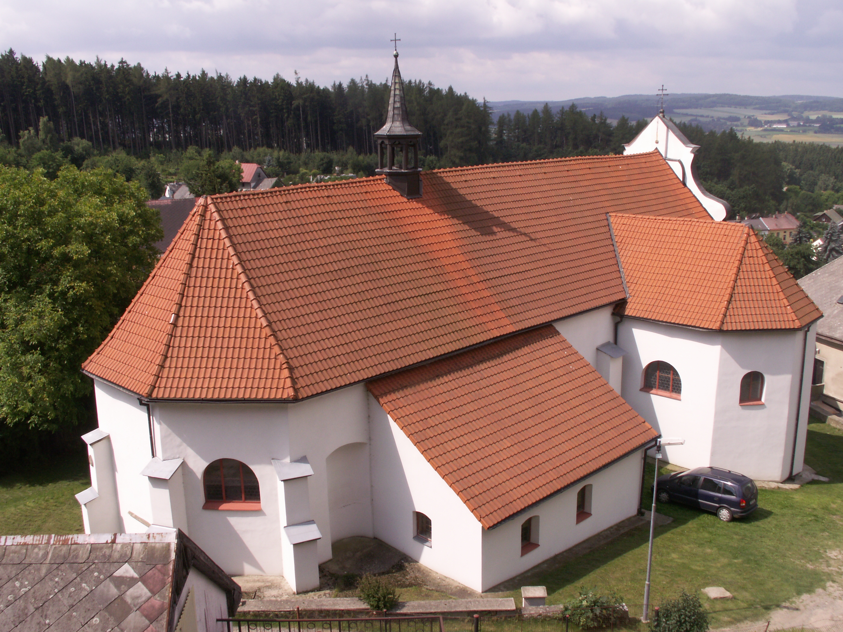 kostel sv. Víta v Lipnici nad Sázavou